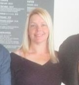 Karen Disher aux Arts Ludiques de Paris en 2015